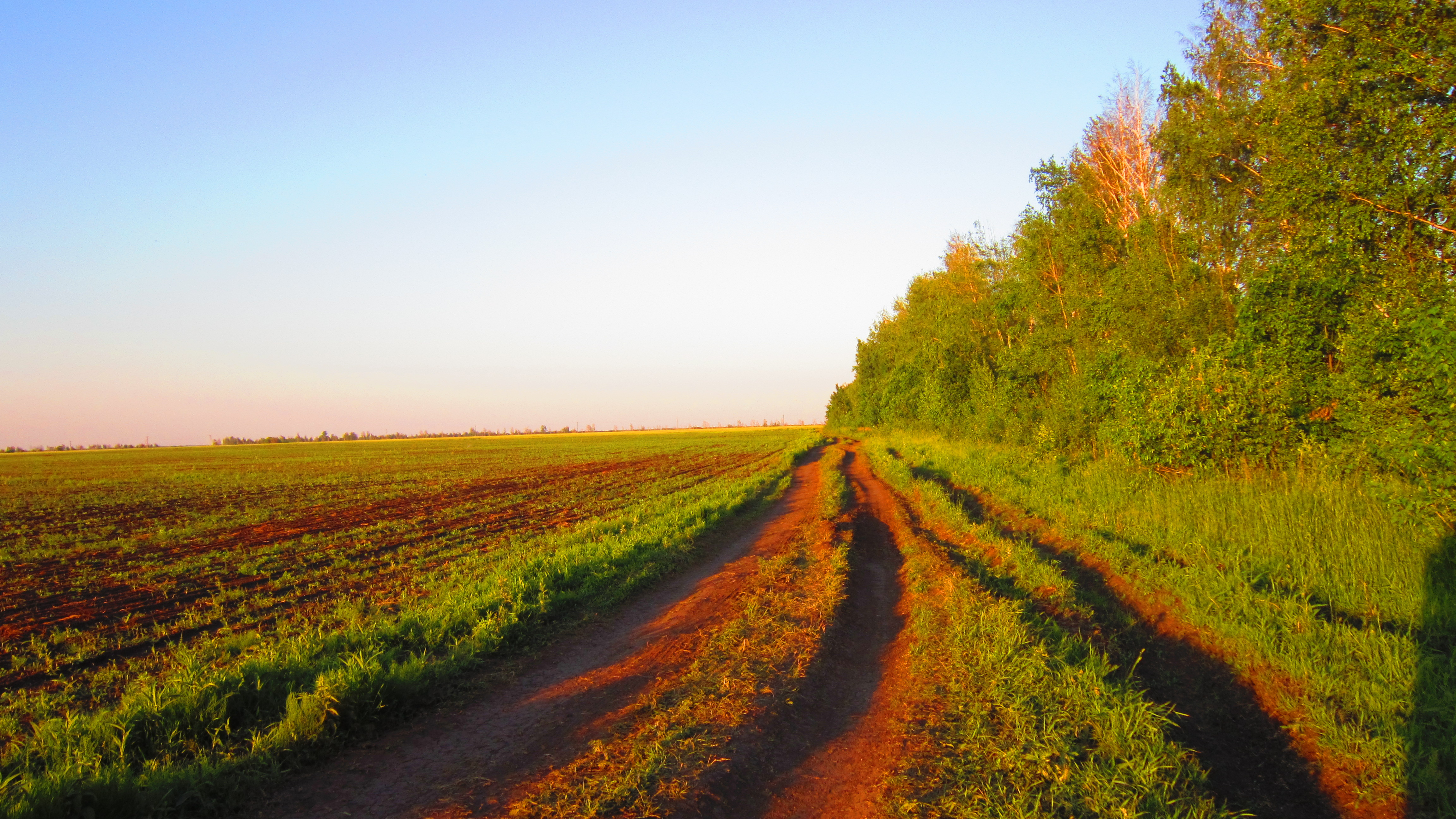 Дорога по краю поля